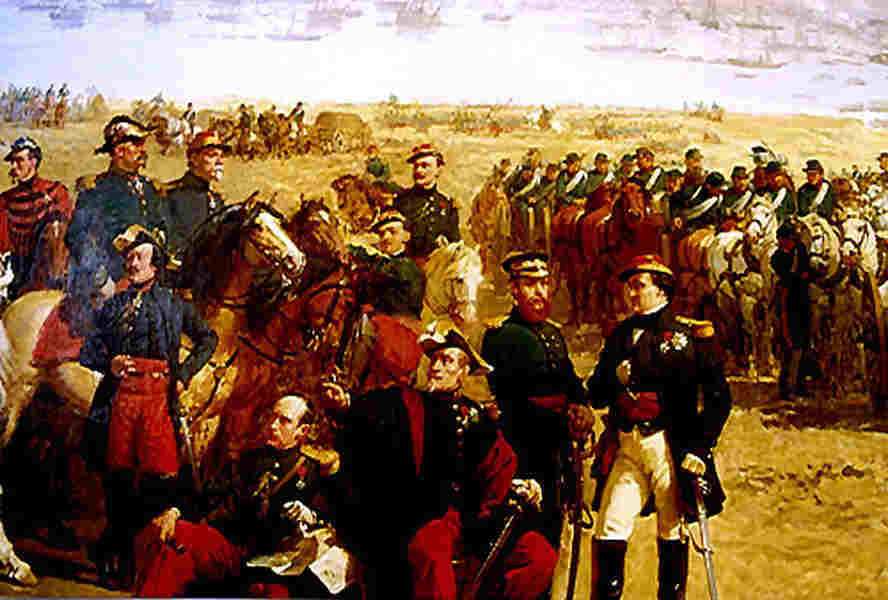 Troupes alliées en Crimée